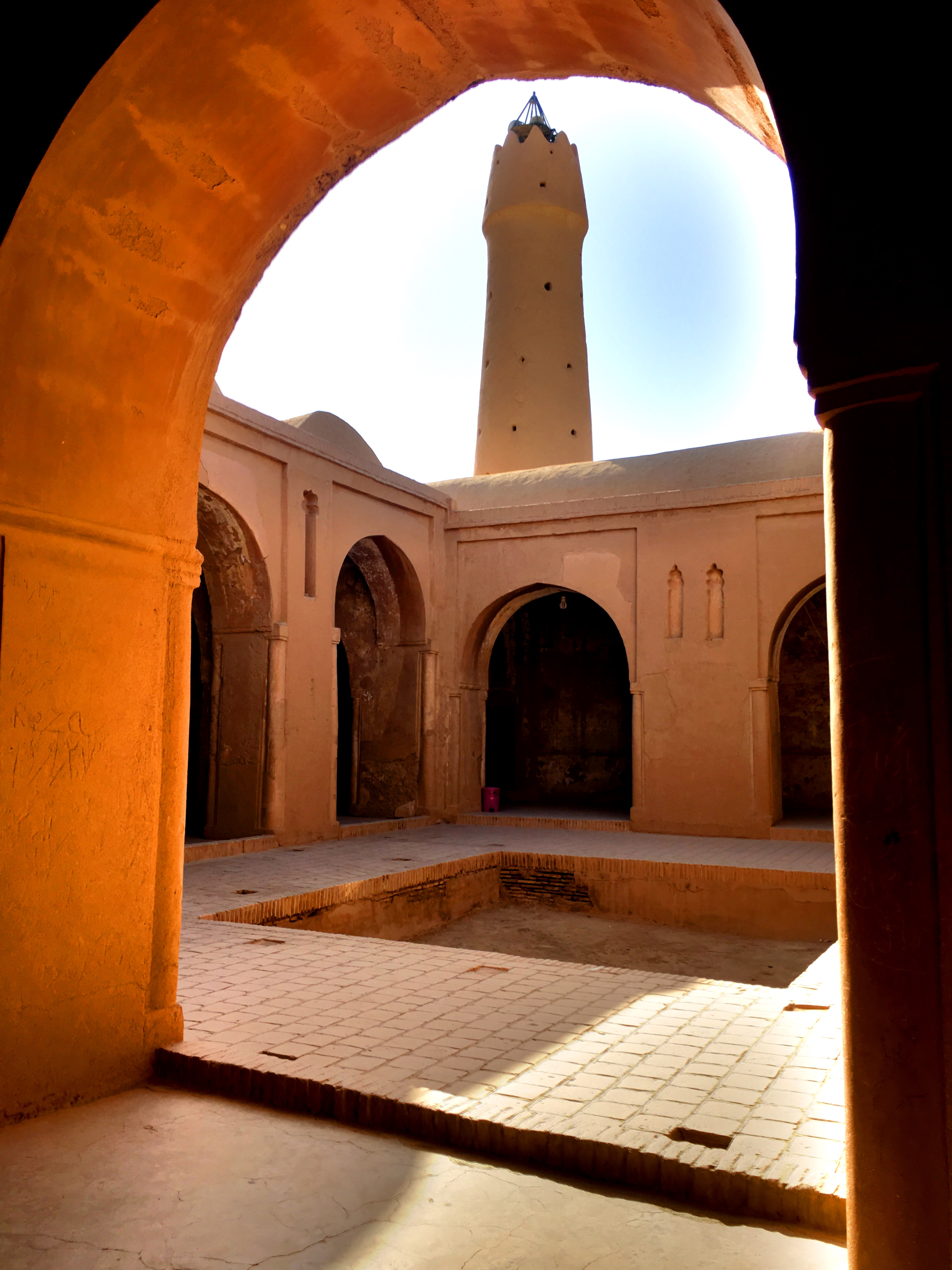 مسجد جامع فهرج با قدمتي در حدود ١٣٠٠ سال در روستاي تاريخي با قدمتي نزديك به ٥٠٠٠ سال